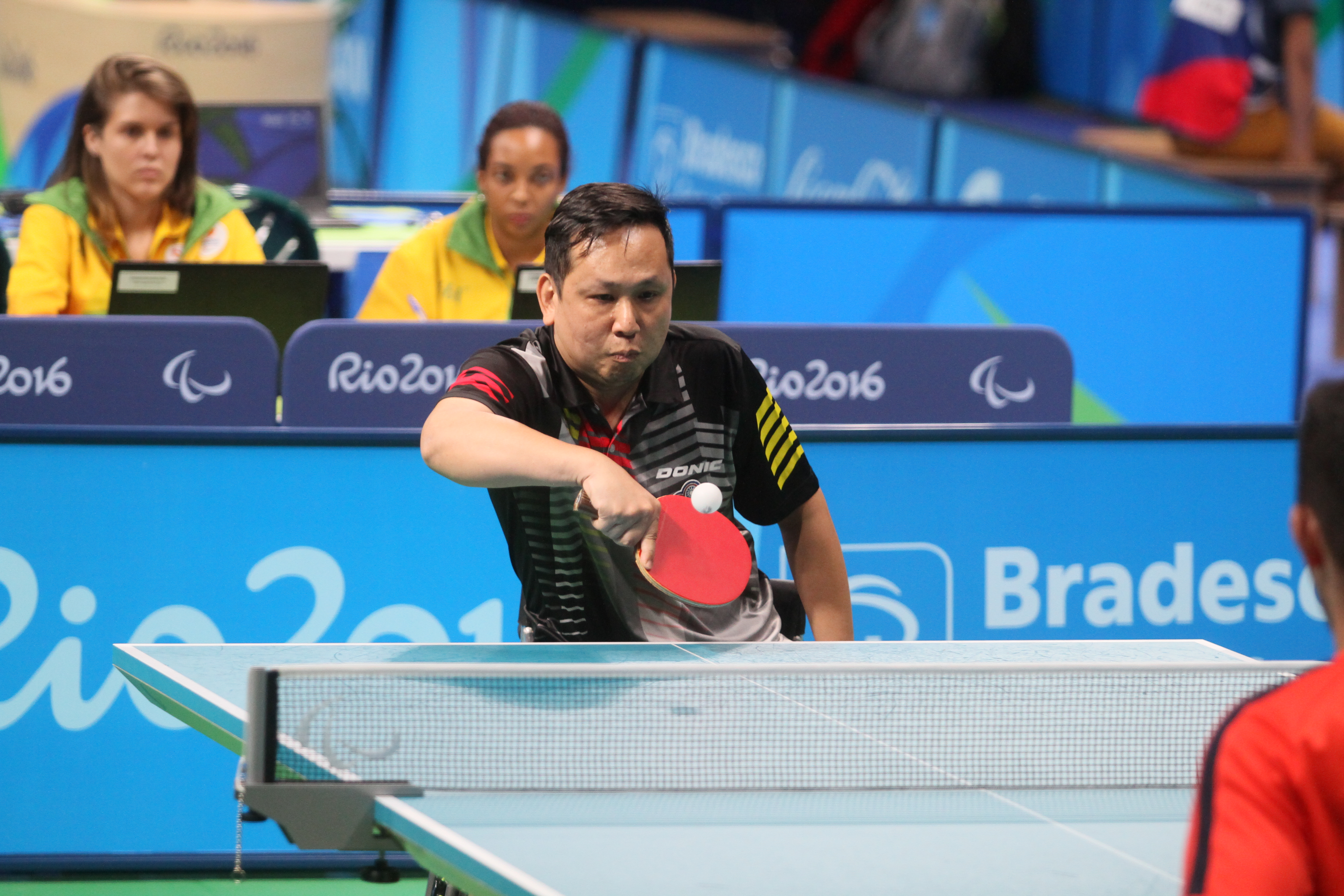 CHENG Ming Chih (TPE,M5) IMG_5821